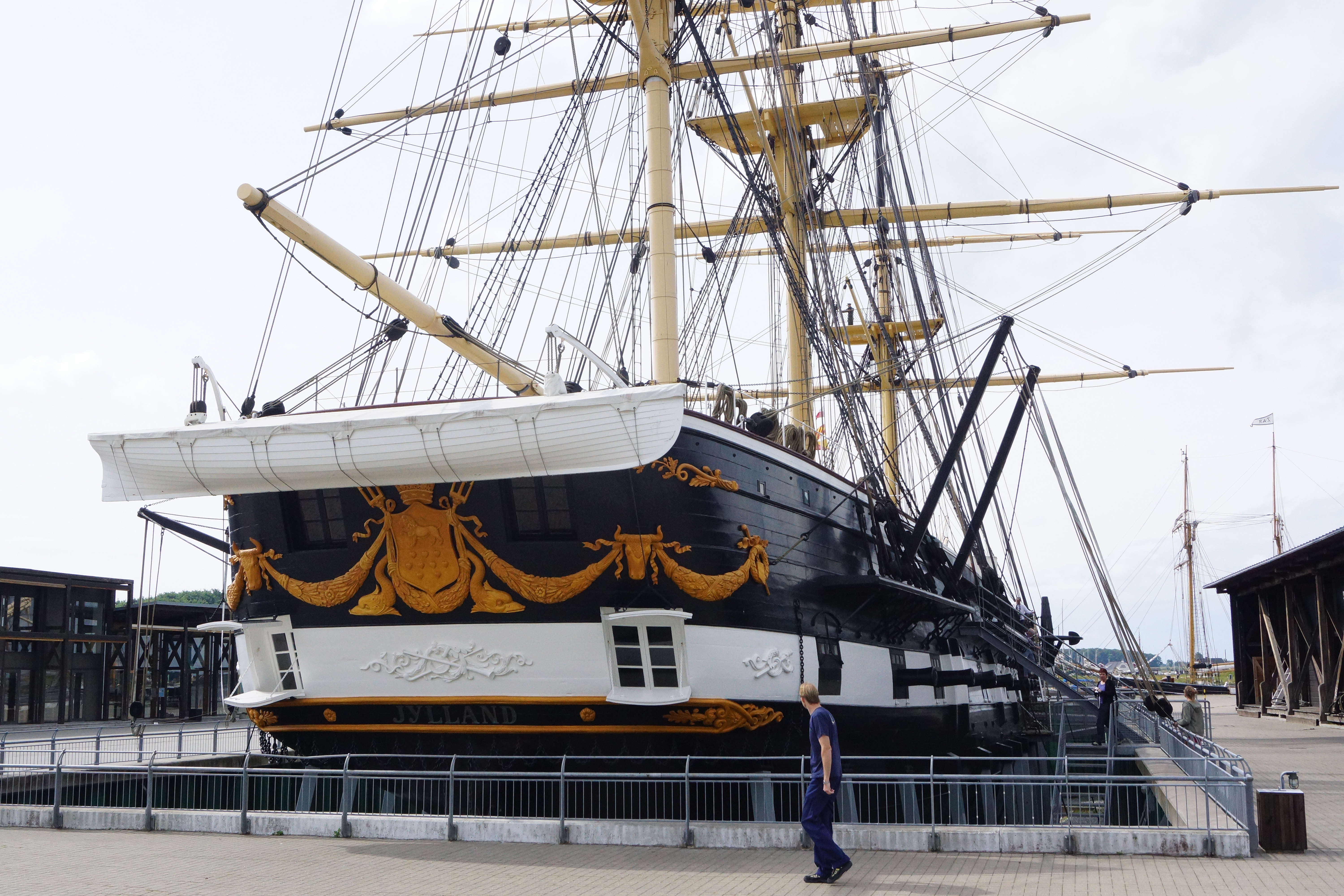 Fregatten Jylland bagfra